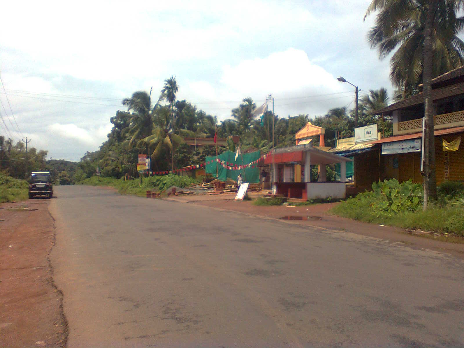 അടുത്തില ബസു്സ്റ്റോപ്പു്